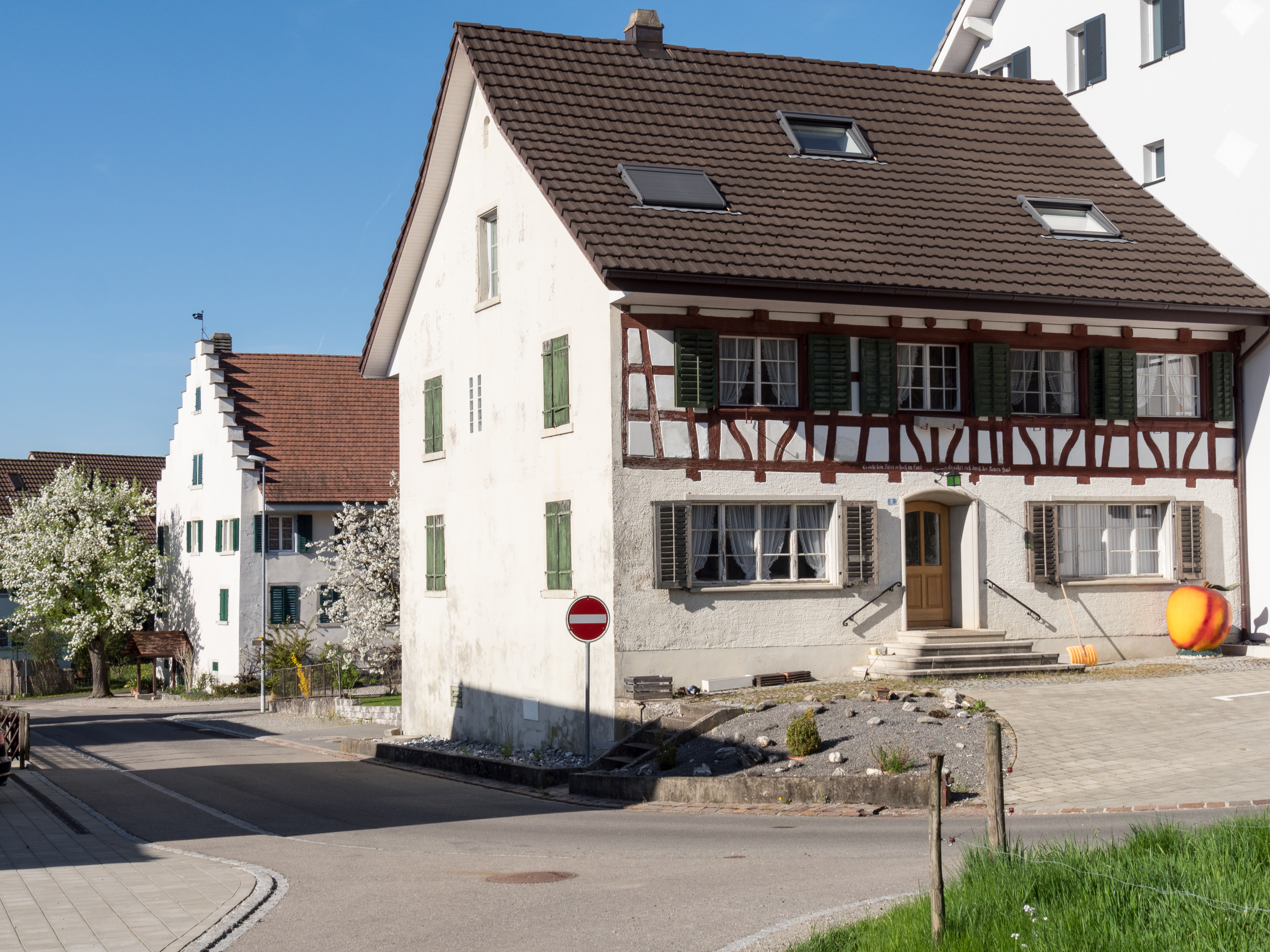 Im Ortskern von Wellhausen TG